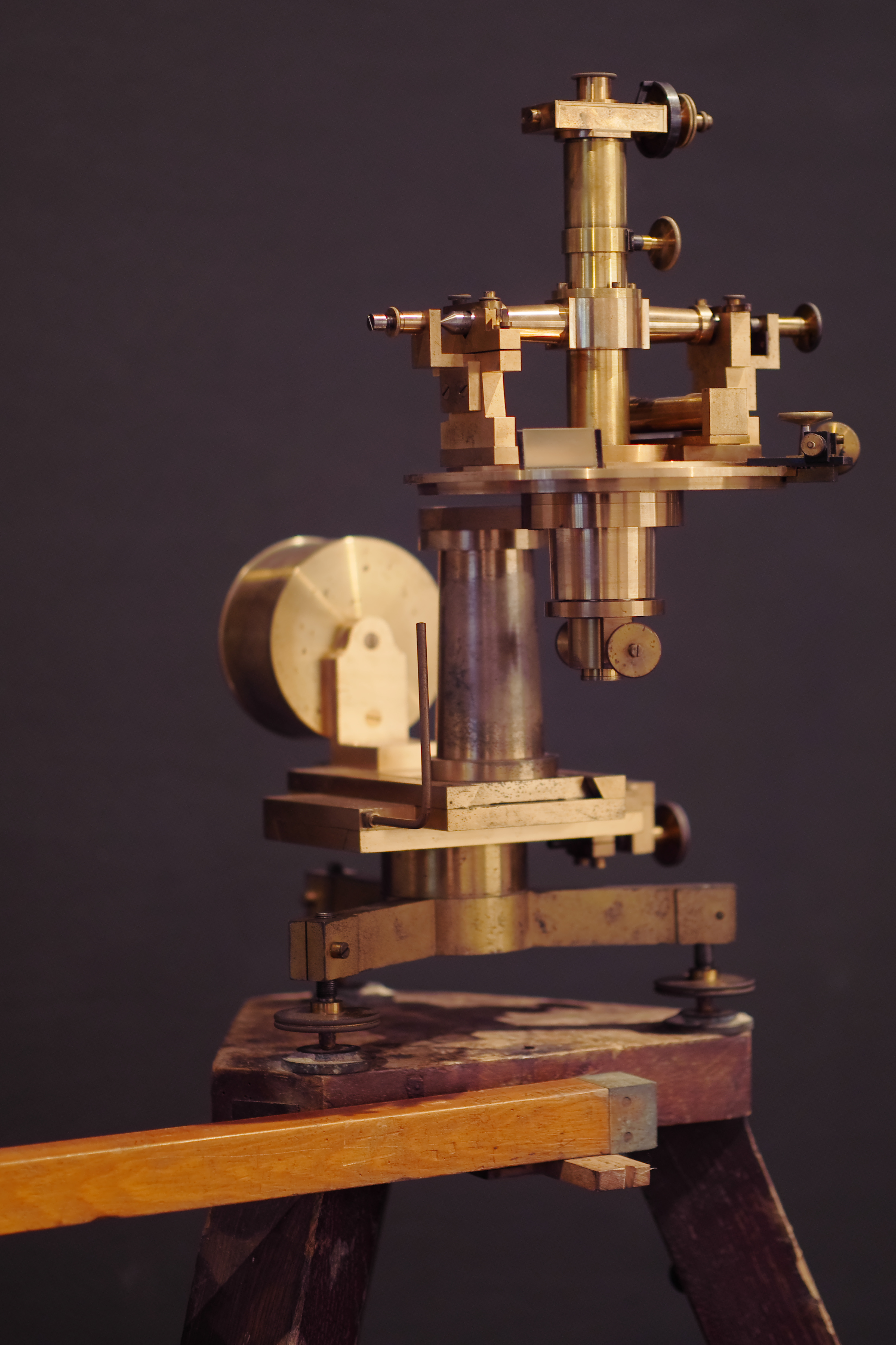 Basisapparat zur Ausmessung von Basislinien. Hersteller Gebrüder Brunner in Paris, Baujahre 1876 bis 1878, Exponat der Ausstellung 2017 vom GeoForschungsZentrum Potsdam